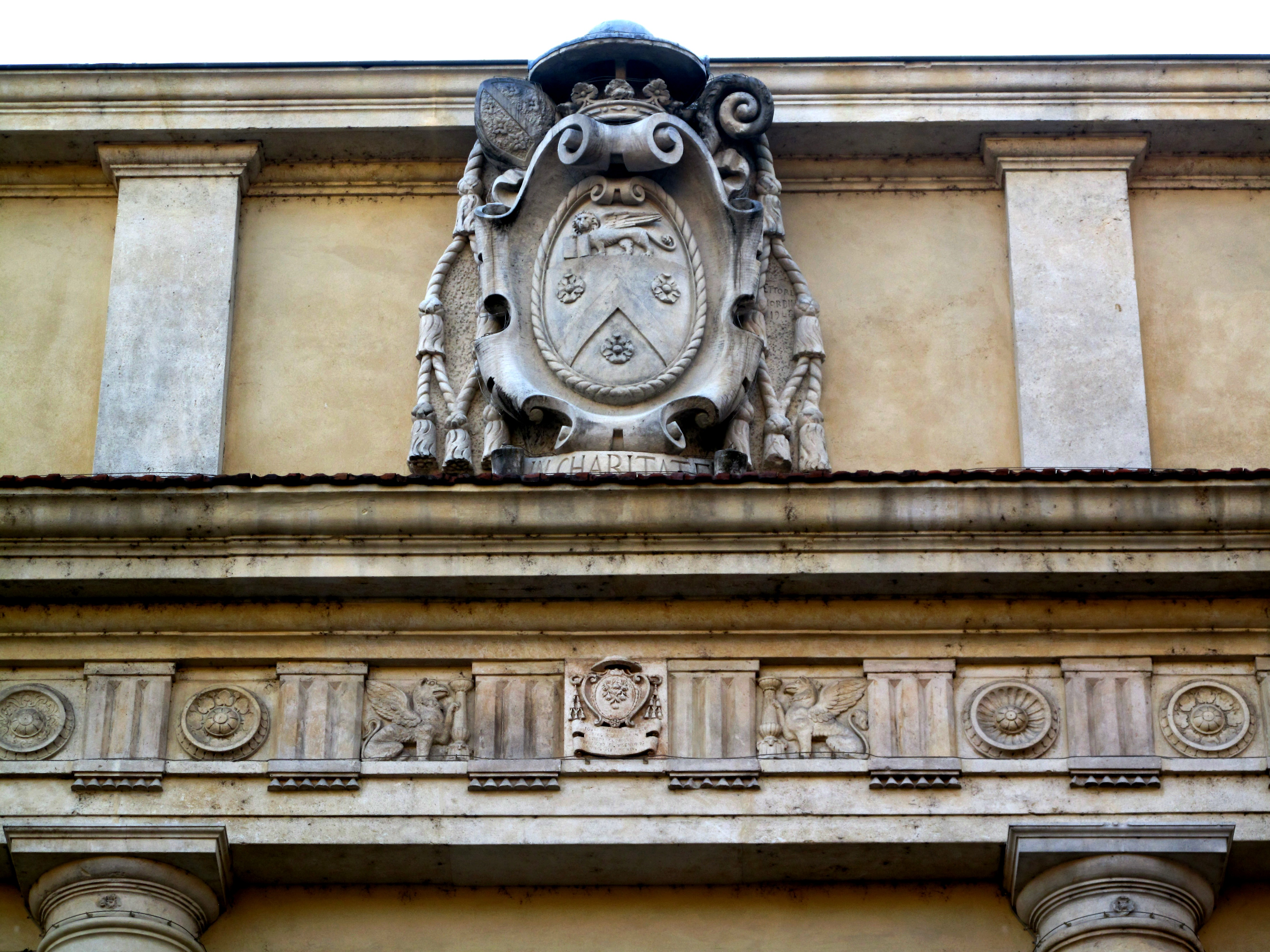 Vescovado di Vicenza - Facciata - stemma Zinato